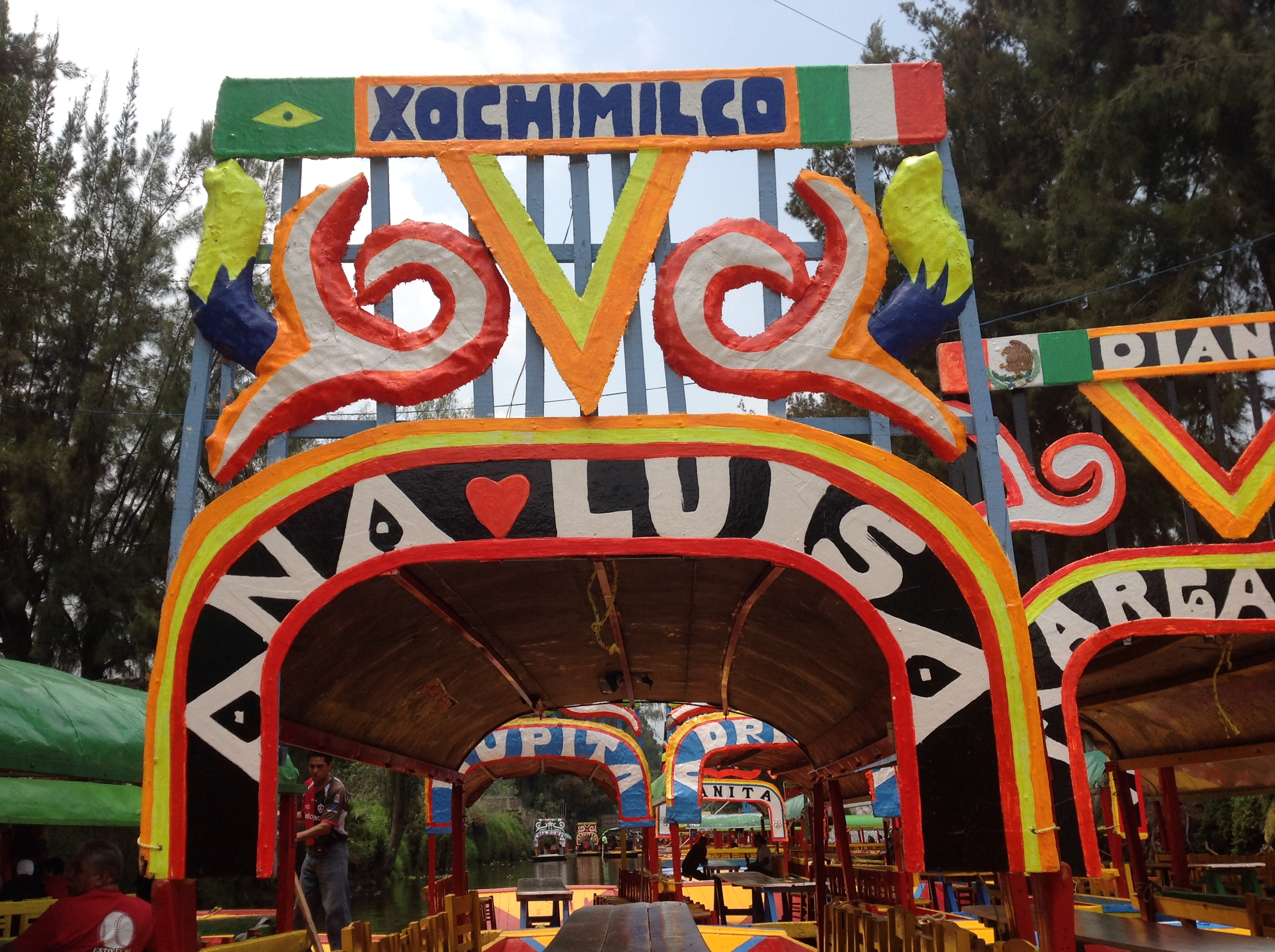 Foto de una trajinera en Xochimilco, México DF